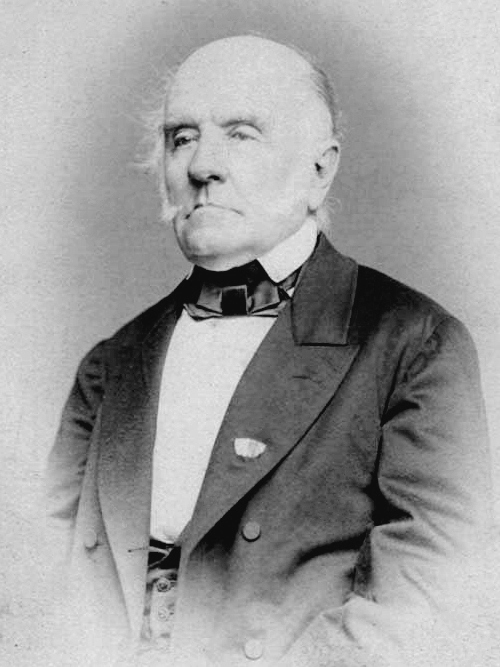 Official picture as prime minister